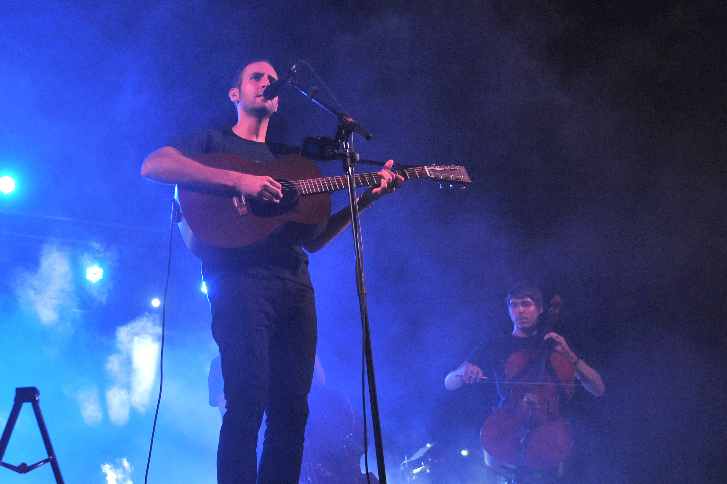 Concert de Blaumut a Esplugues de Llobregat, 20 de setembre 2014.